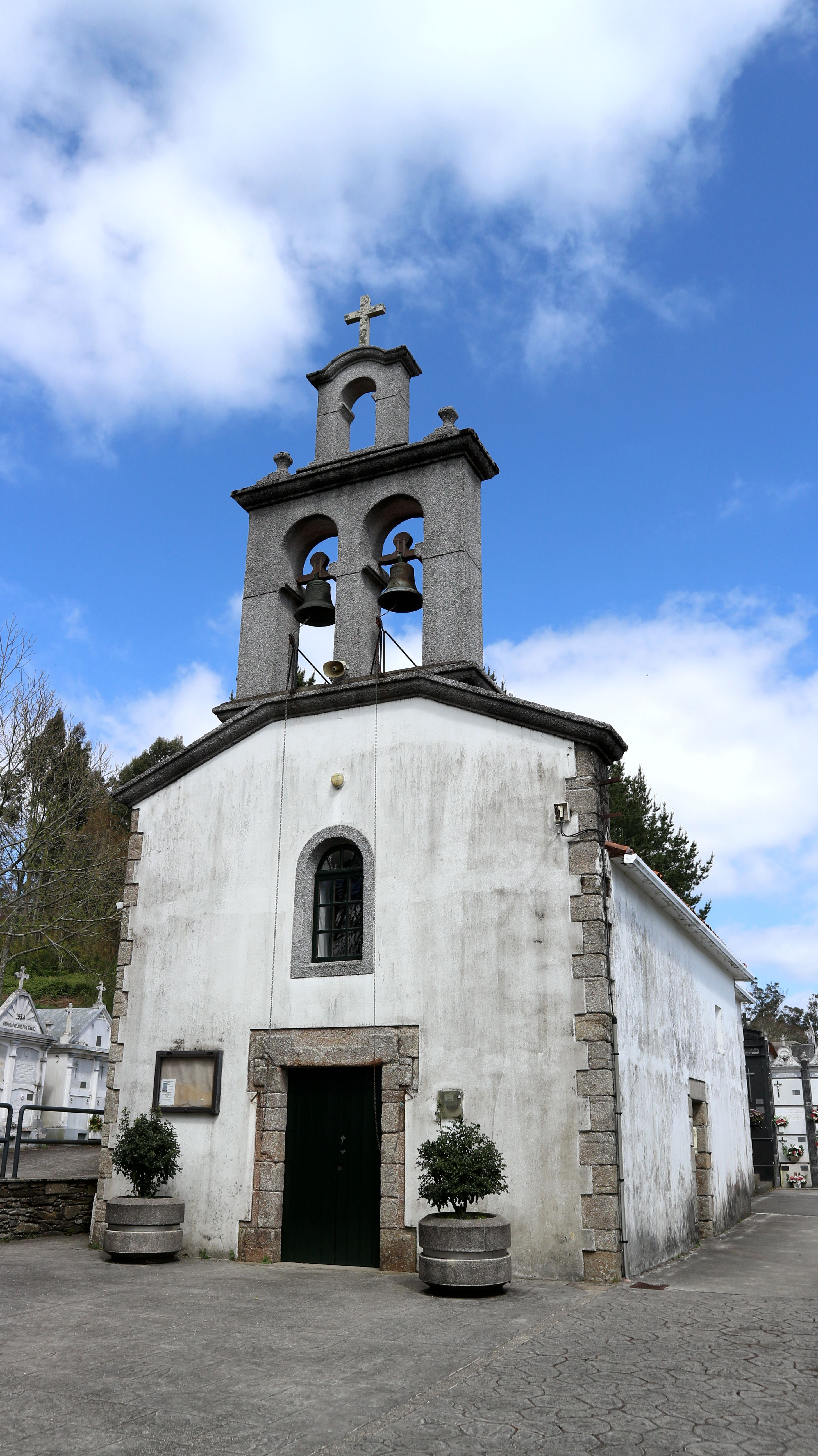 Igrexa de San Mamede de Bragade. Bragade, Oza-Cesuras.